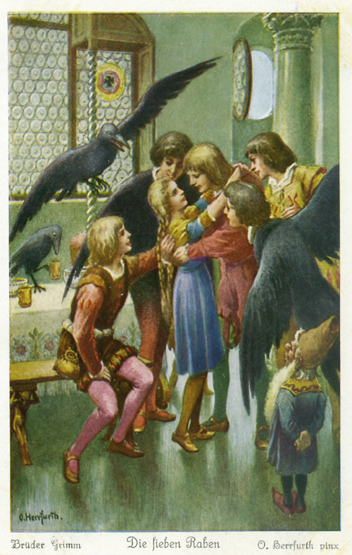 Die sieben Raben. Postkartenserie nach dem Märchen. Serie von sechs Postkarten der Firma Uvachrom. Serie 320, Nr. 4888–4893. Text der Rückseite: Als die Raben heimkehrten, merkten sie, dass jemand von ihrem Tisch gegessen und getrunken hatte. Auch das Ringlein fanden sie und erkannten es als Vaters Geschenk. Da sprach der Jüngste: Wenn nur Schwesterchen käme und uns erlöste. Plötzlich trat es hervor und umarmte die Raben, die nun wieder Menschen wurden. Da zogen sie fröhlich heimwärts.